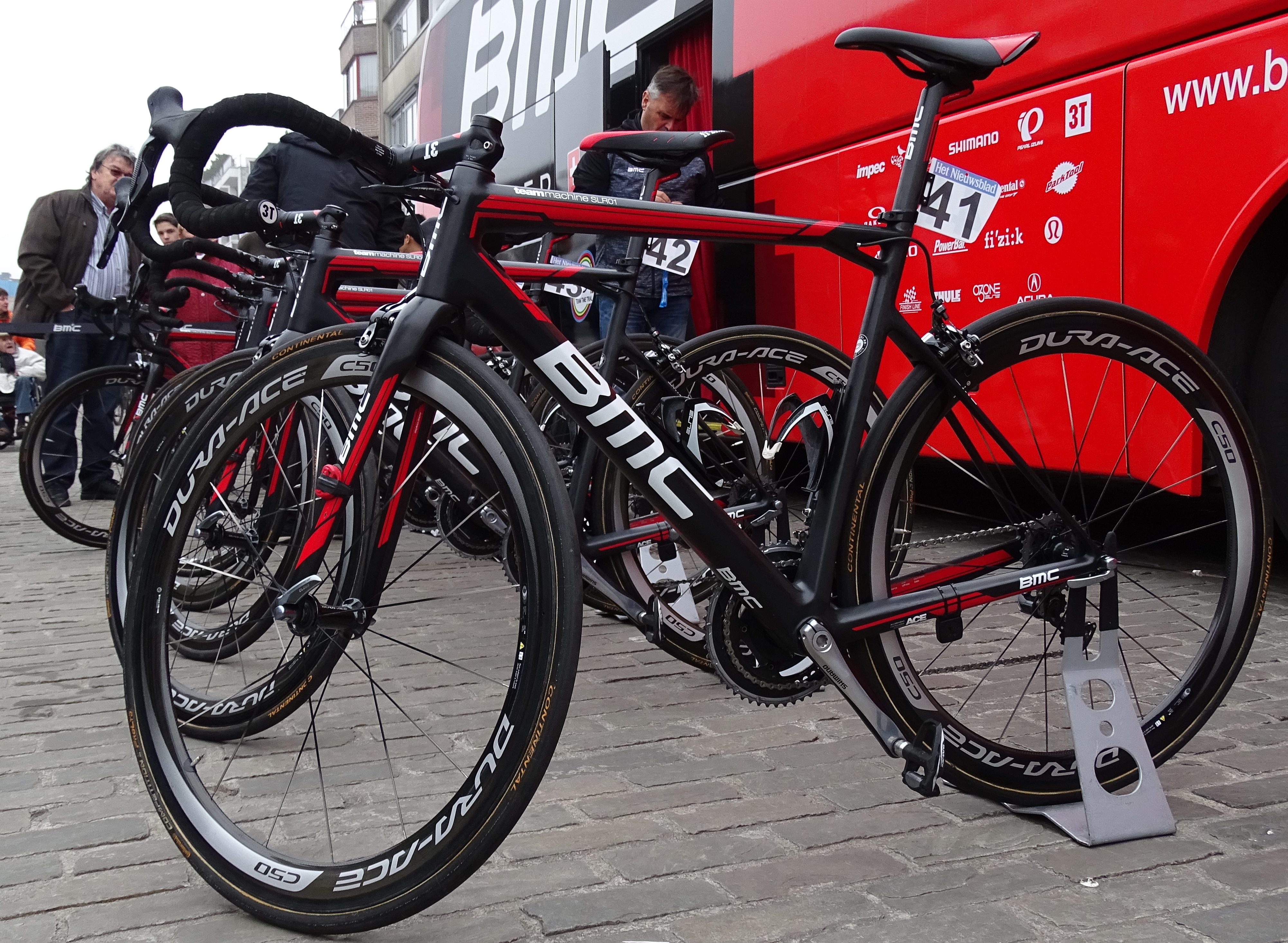 Reportage réalisé le mercredi 18 mars à l'occasion du départ de la Nokere Koerse 2015 à Deinze, Belgique.